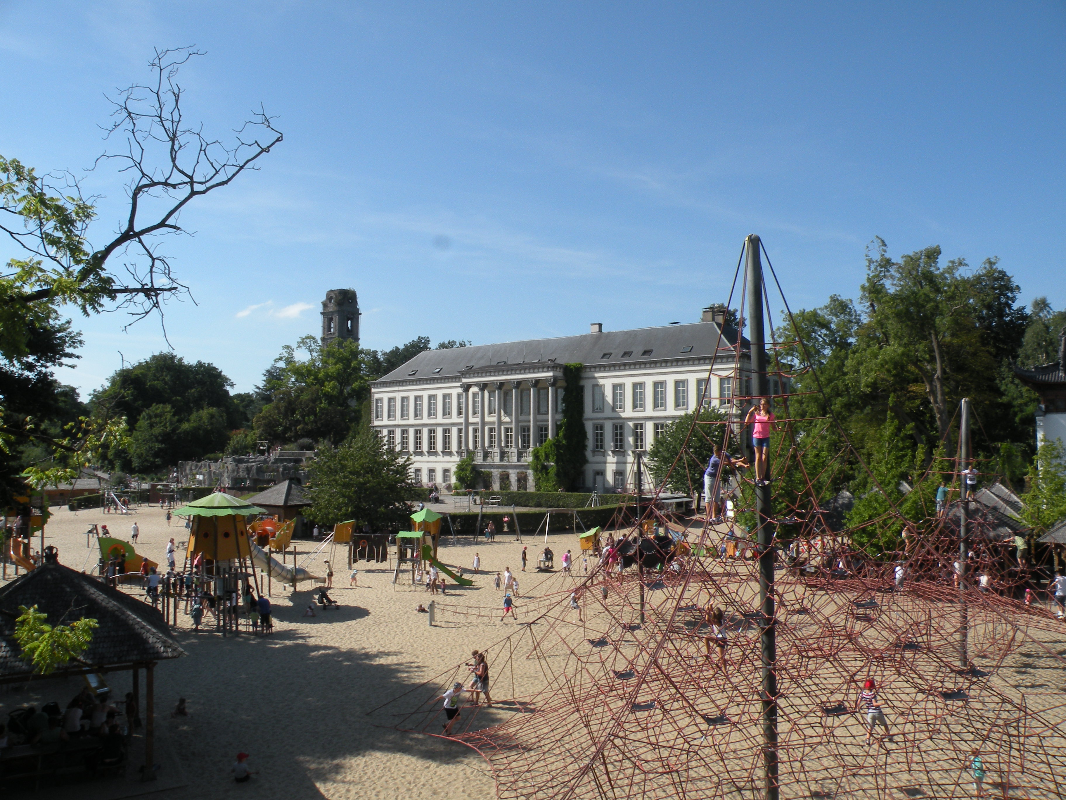 Château de Cambron